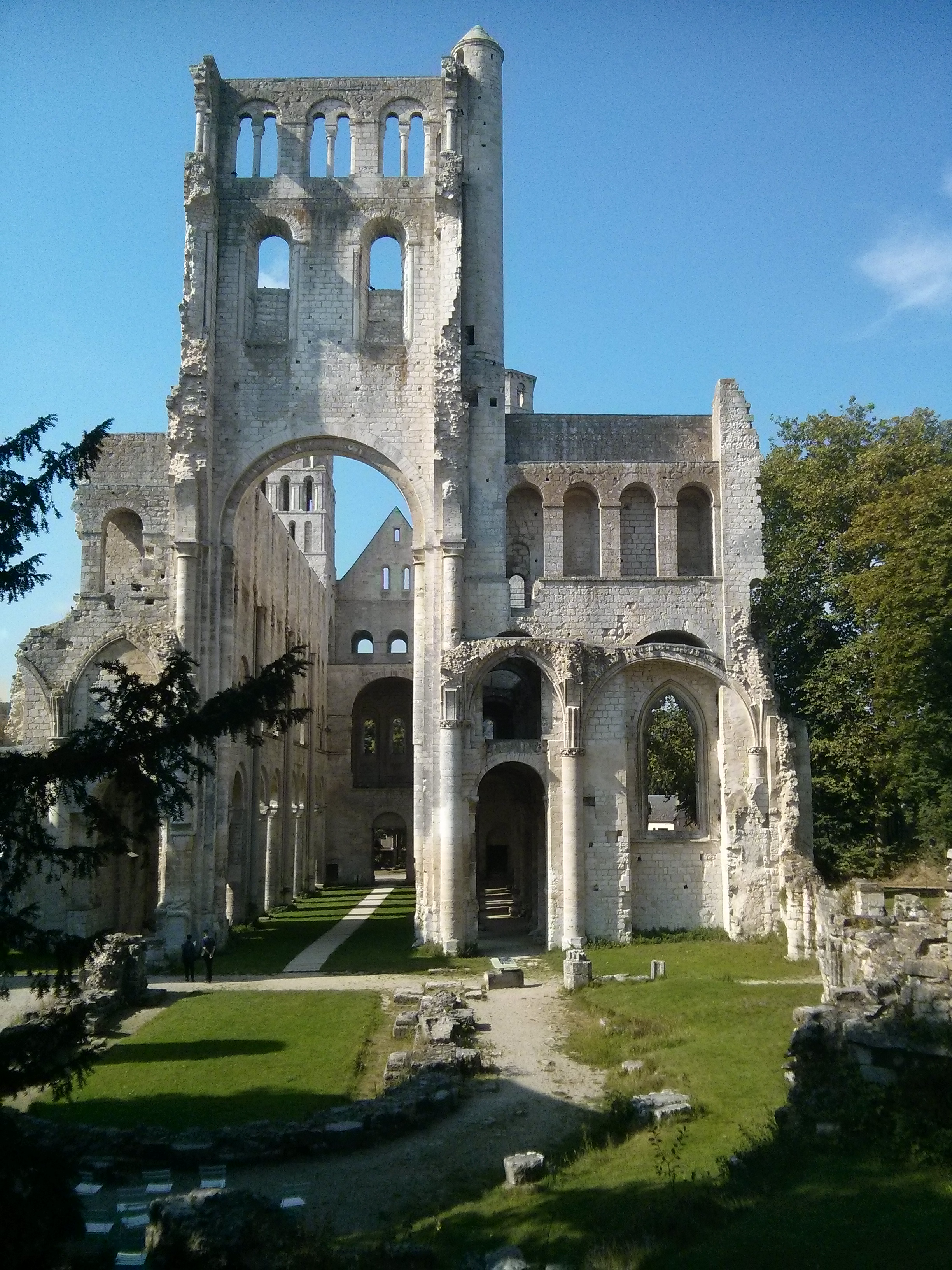 Transept et nef de l'église abbatiale Notre-Dame au sein de l'Abbaye de Jumièges (Seine-Maritime, France)